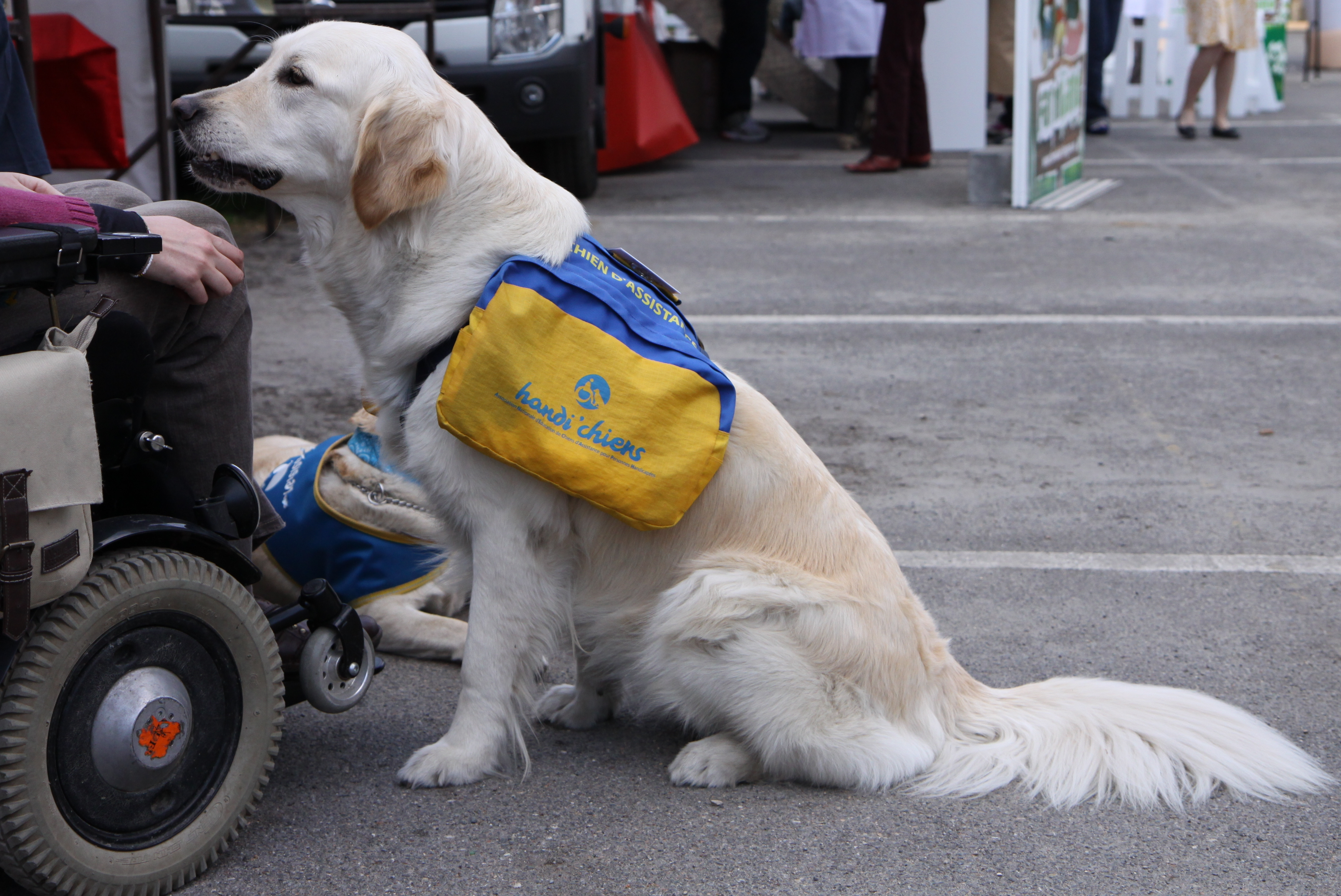 Chien d'assistance aux handicapés moteurs.